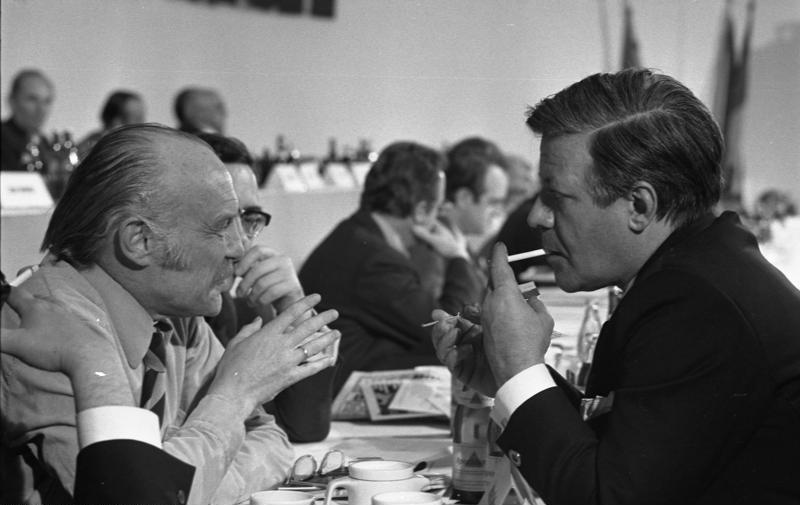 Bundesparteitag der SPD in Hannover (links: Jochen Steffen, rechts: Helmut Schmidt) 10.-14.4.1973